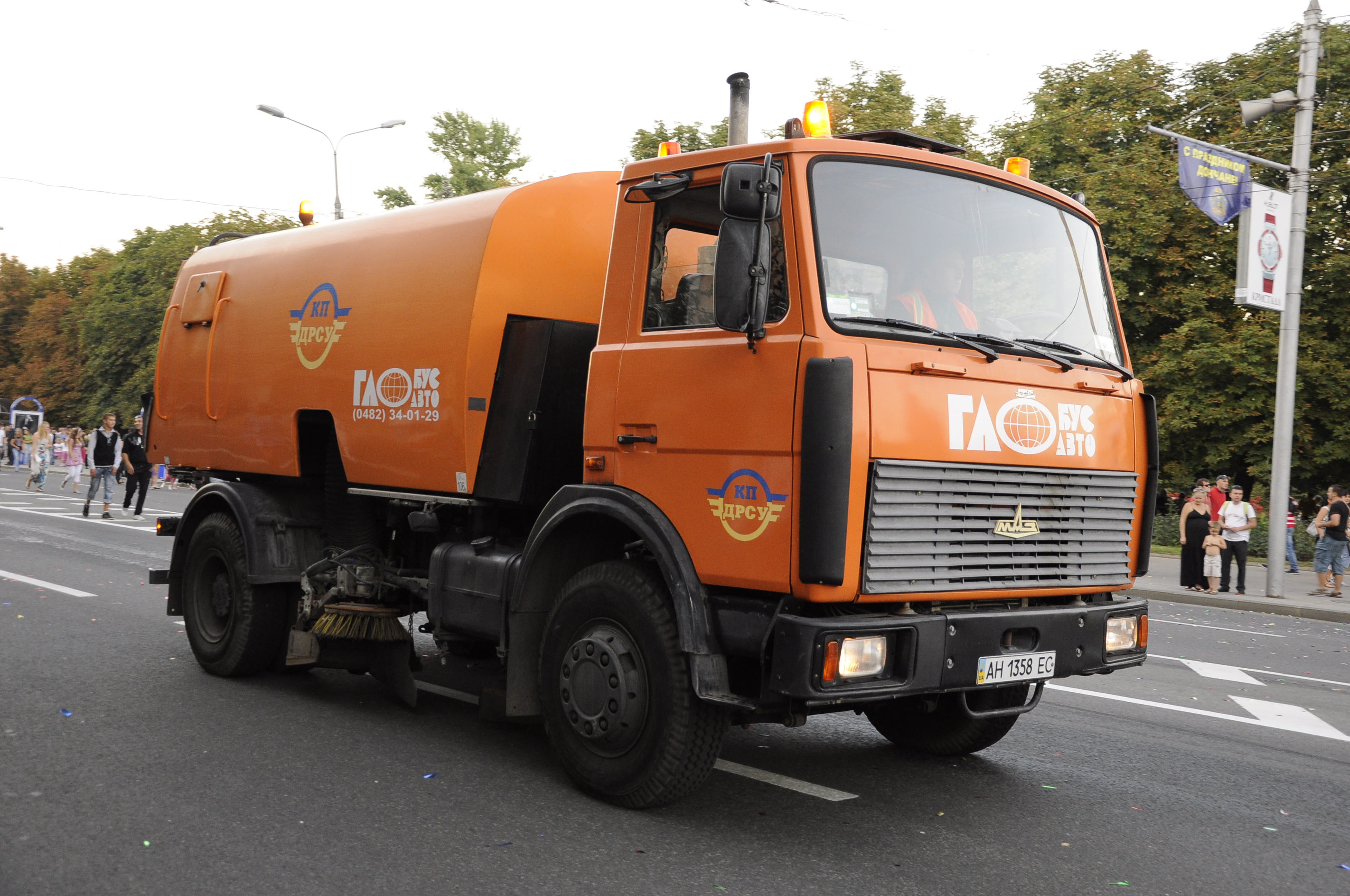 Донецк. День города. Карнавал.